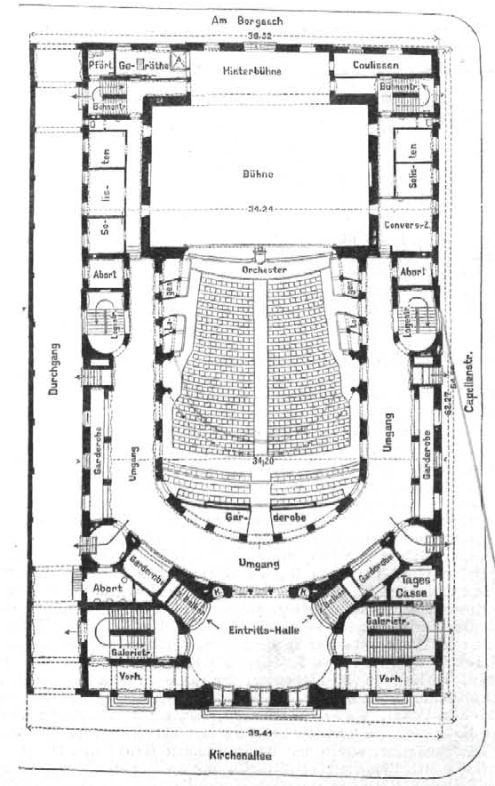 Deutsches Schauspielhaus, Neubau 1901, Grundriss des Erdgeschosses This is a photograph of an architectural monument.